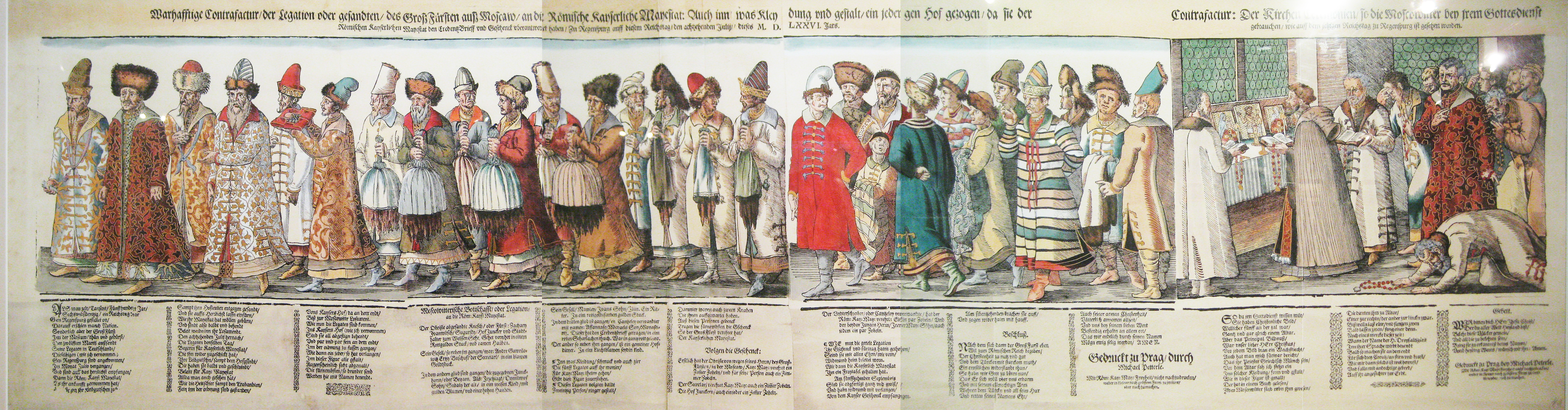 «Русское посольство к императору Священной Римской империи Максимилиану II в Регенсбурге». 1576 г.